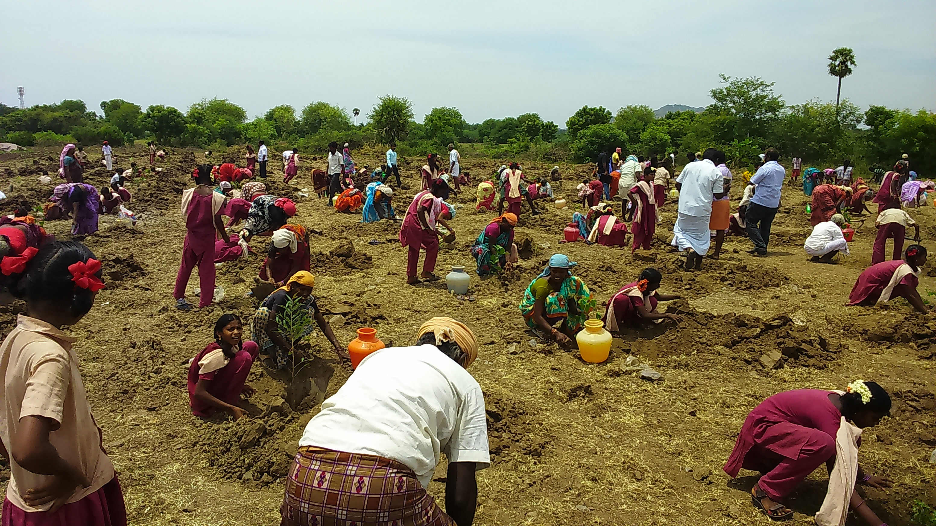 மரம் வளர்ப்போம்